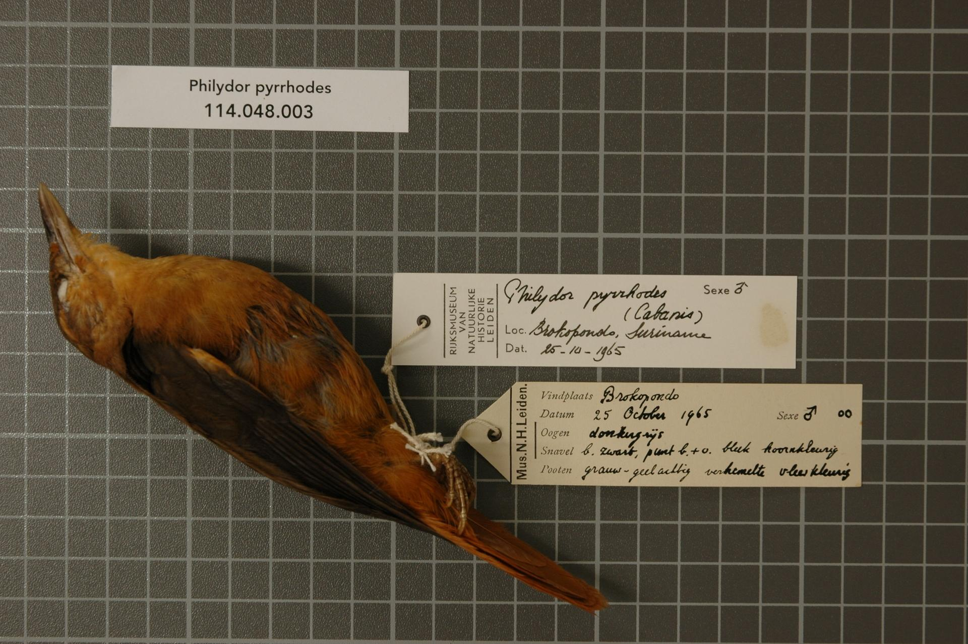 Philydor pyrrhodes (Cabanis, 1848)